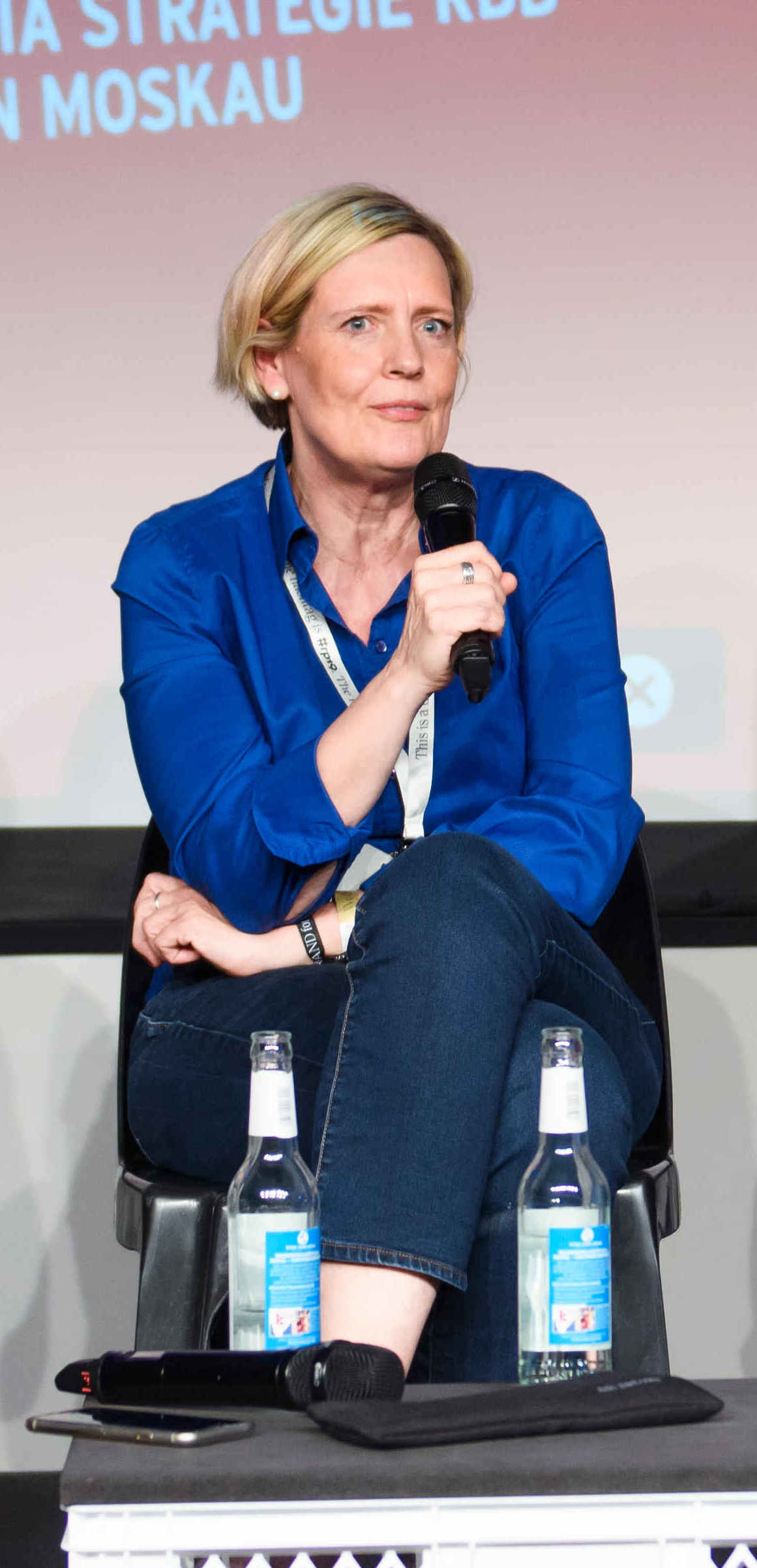 Session: Entlarven oder ignorieren – was müssen die Öffentlich-Rechtlichen gegen Fake News tun? Speaker: Jan Schulte-Kellinghaus, Stefan Niggemeier, Patrick Gensing, Anna-Mareike Krause, Ina Ruck, Teresa Sickert